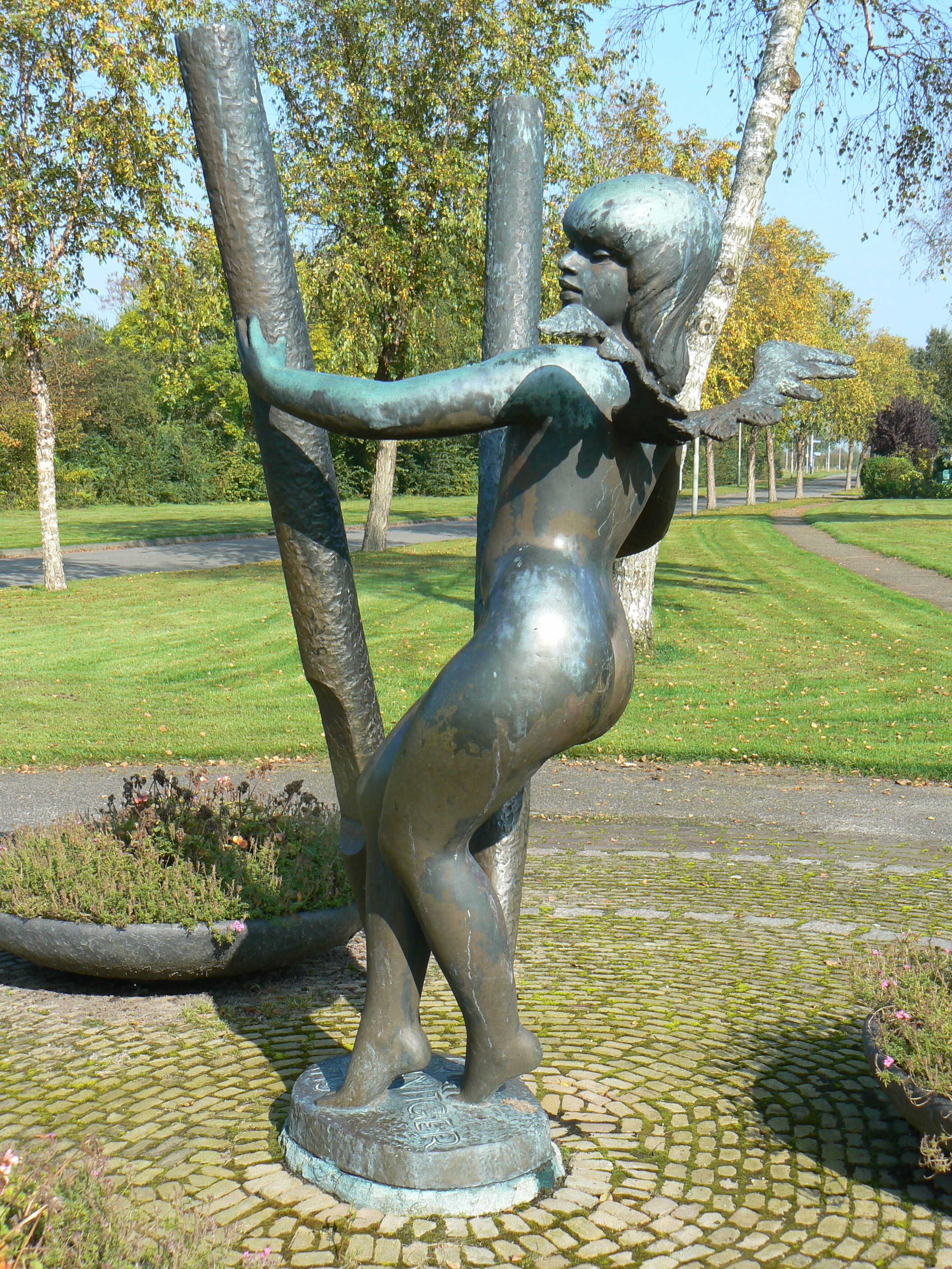 sculpture Engel (met orgelpijpen) 1976 by Wladimir de Vries in Uithuizen/The Netherlands